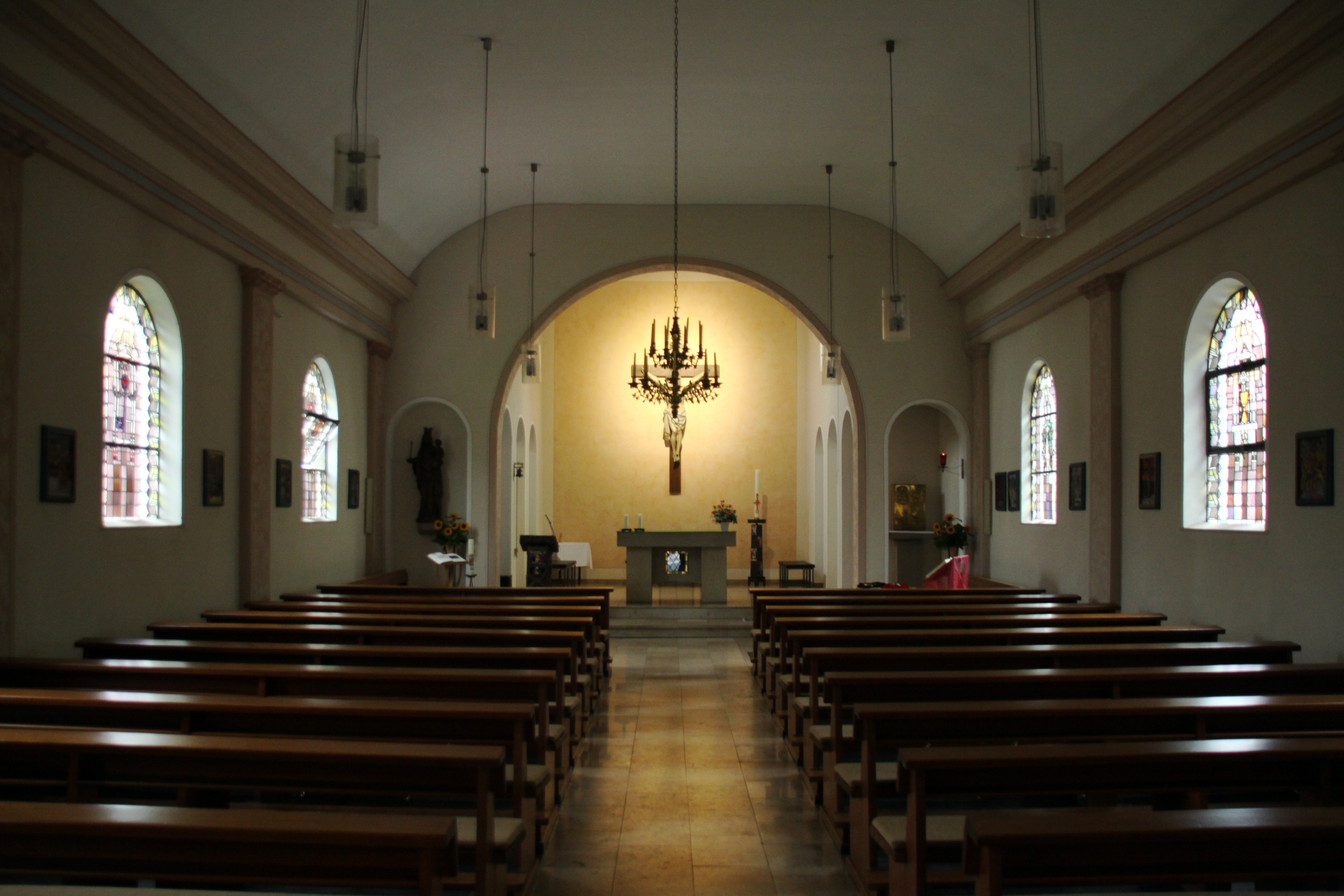 Innenraum der Ludgerus Kirche (Aurich)